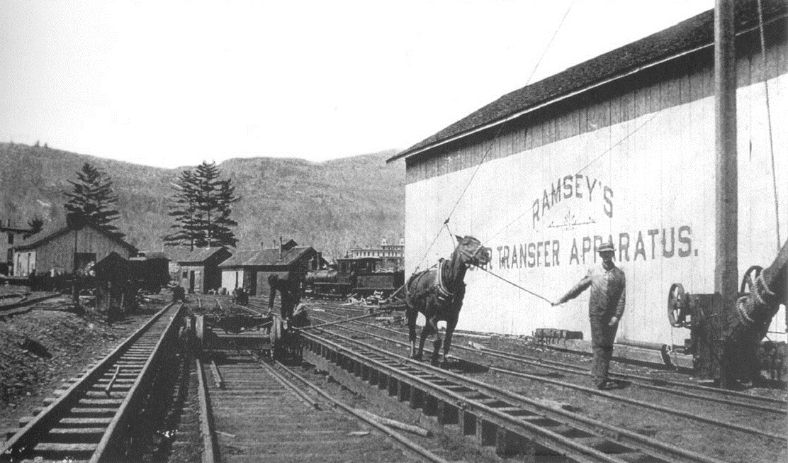 Ramsey's Car Transfer Apparatus used at Phoenicia in 1882